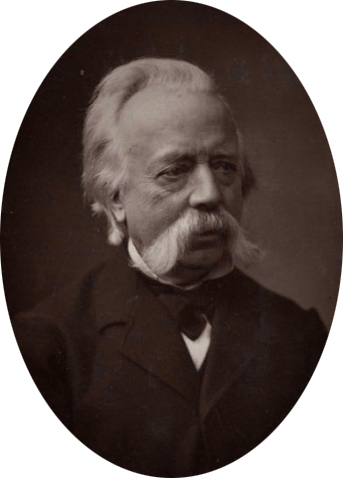 Johannes Warnardus Bilders (circa 1885)